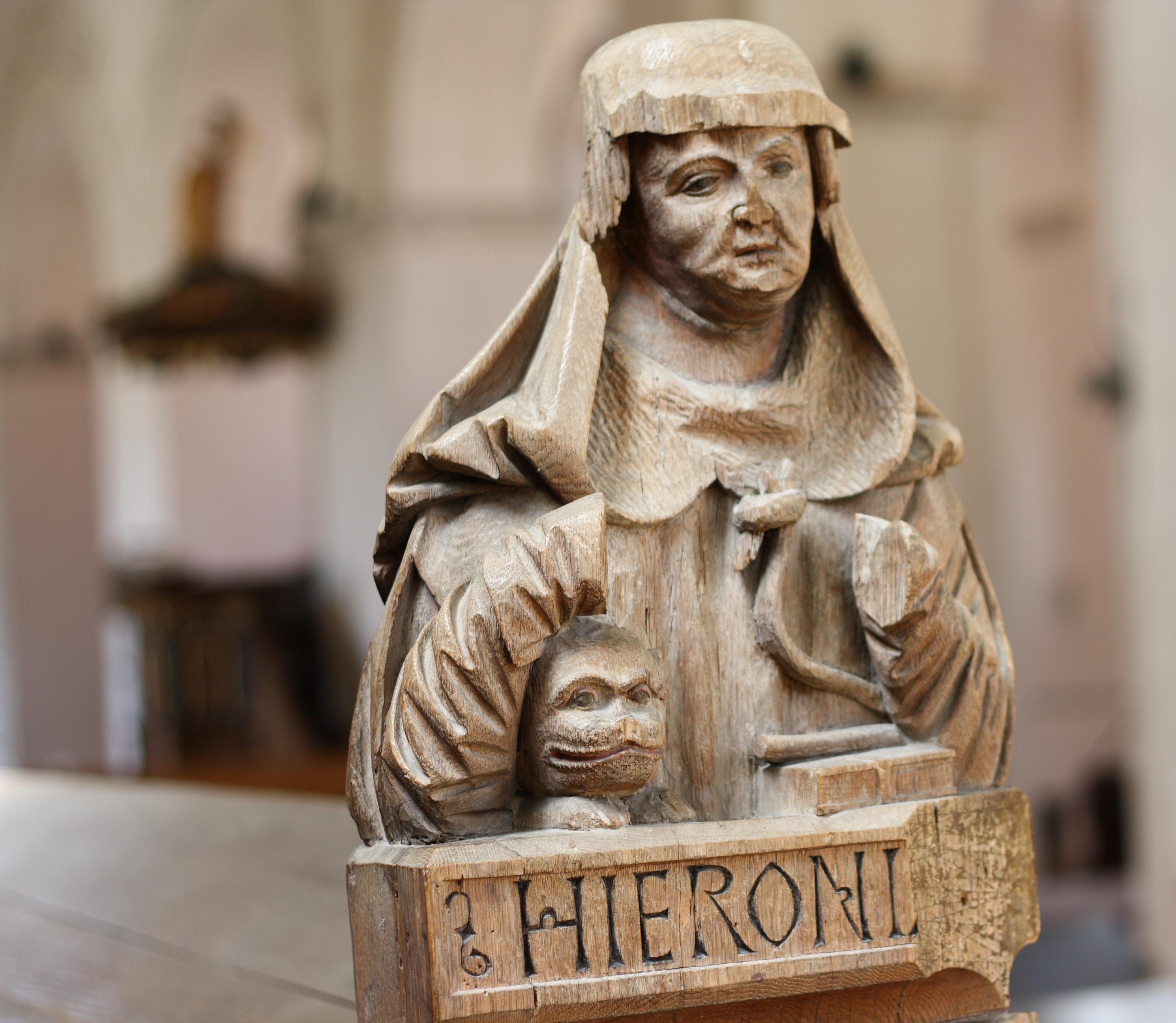 Evangelische Pfarrkirche, ehemalige Benediktinerklosterkirche St. Maria in Auhausen im Landkreis Donau-Ries (Bayern), Chorgestühl von 1519 von Melchior Schabert, Büste des hl. Hieronymus